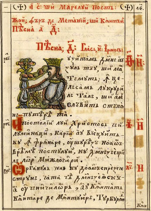 Miniatură din Eclisiiârh de Procopie (Picu) Pătruț (1856)